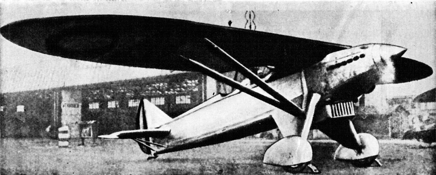 Belgijski samolot myśliwski Renard R.31.